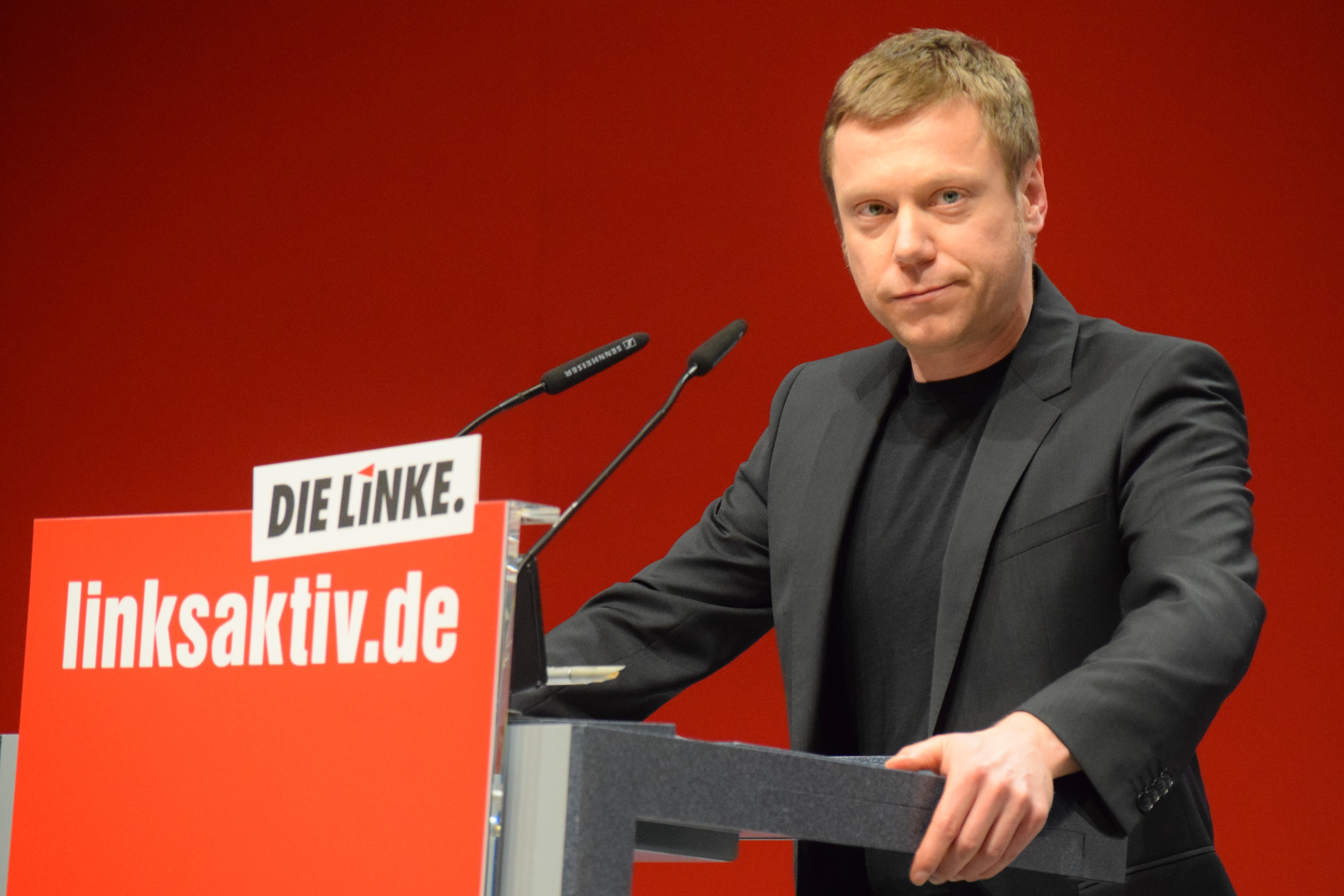 Der Spitzenkandidat Martin Schirdewan auf dem Parteitag der Linkspartei in Bonn. 2. Tagung des 6. Parteitages der Partei DIE LINKE, 22. und 23. Februar 2019, Bonn.